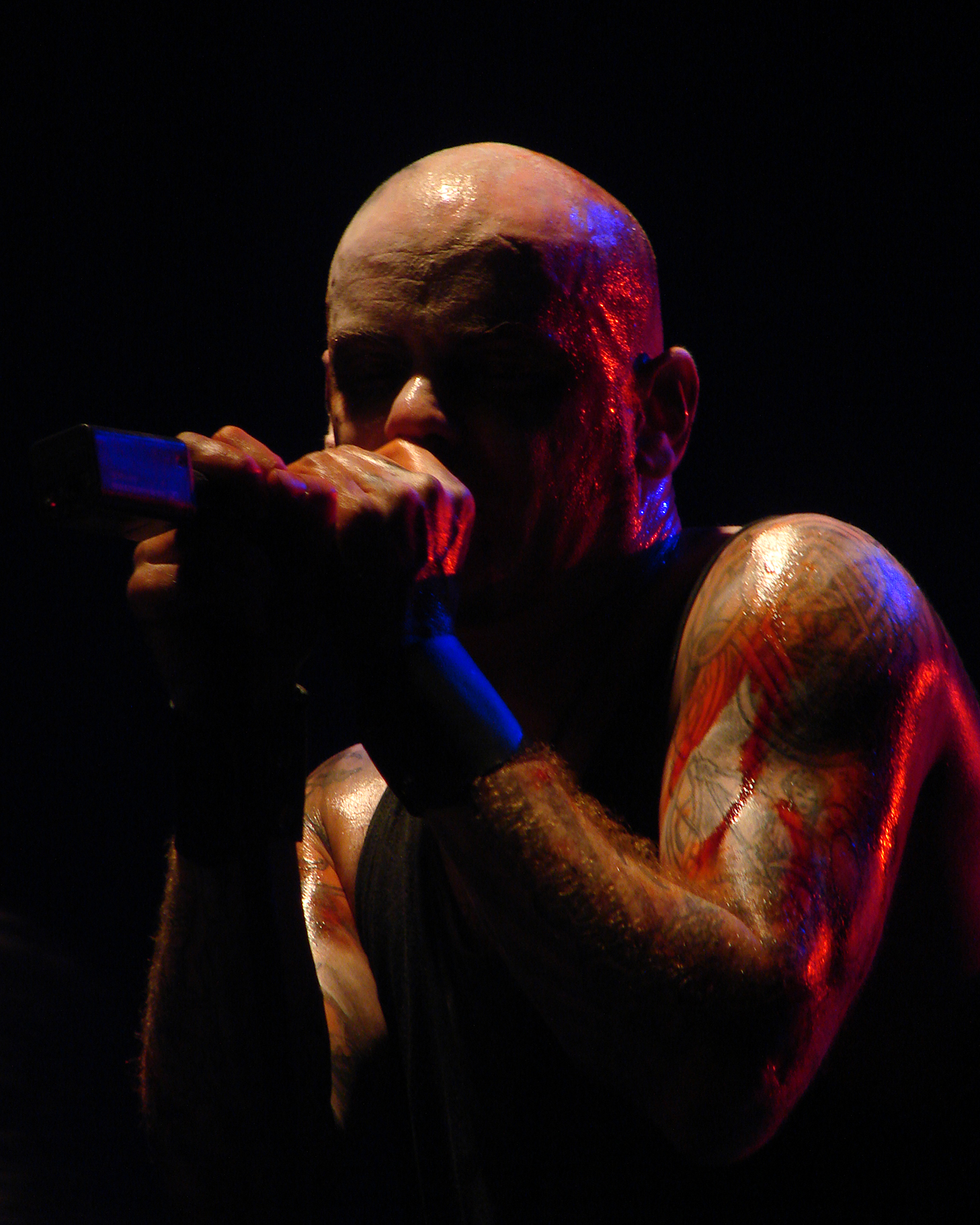 Primordial en concert à la Locomotive, à Paris, pendant le Heidenfest Tour 2008.